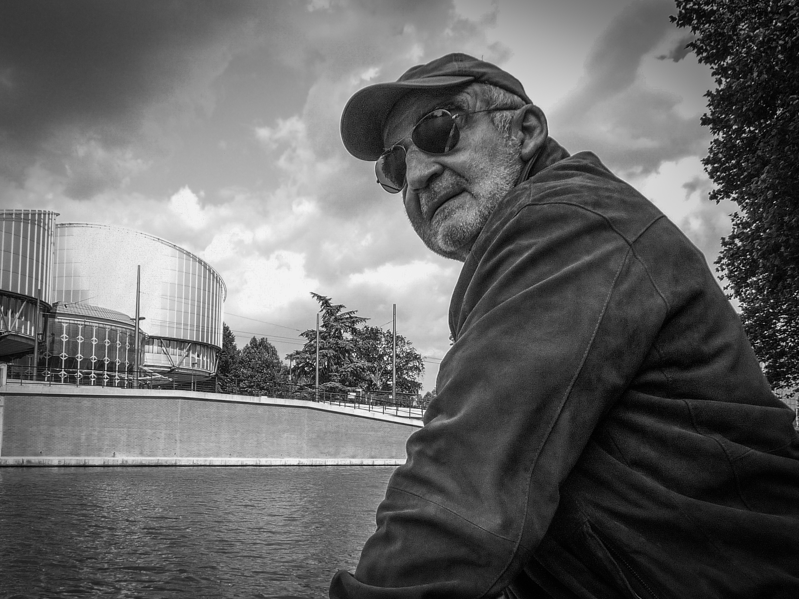 Jean-Louis Foulquier à Strasbourg le 18 juin 2010